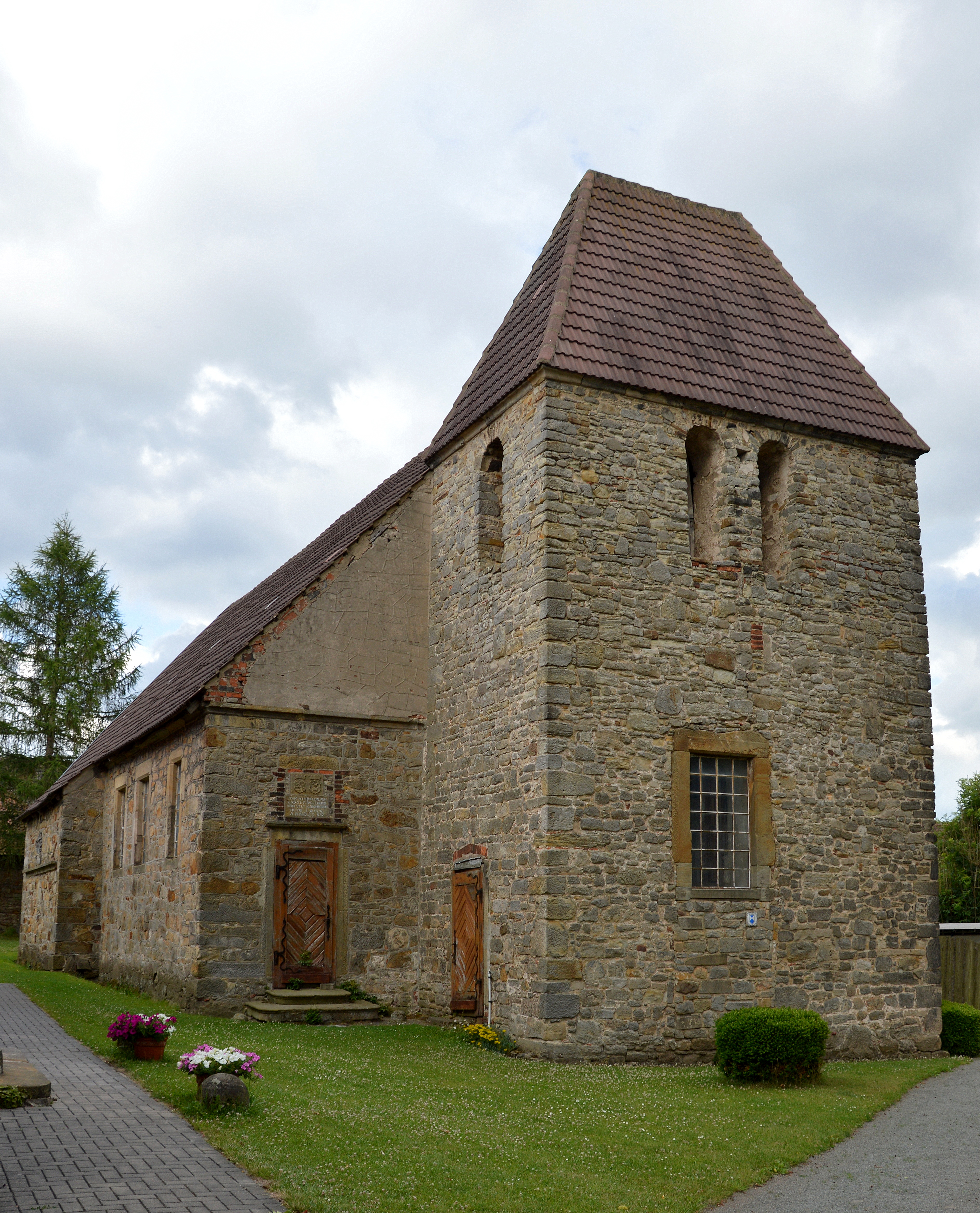 Dorfkirche Groß Bartensleben